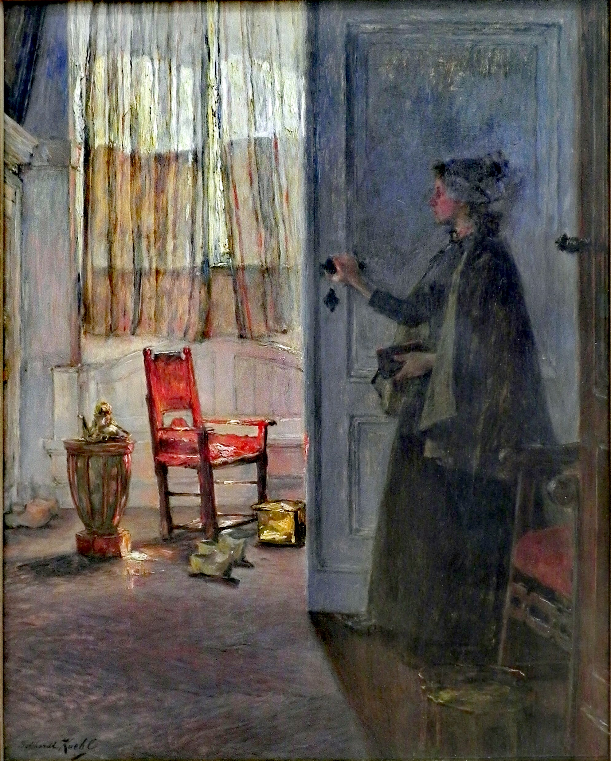 Eine Frau tritt im Schatten der geöffneten Tür in das Zimmer. Die dunkle Kleidung steht im Kontrast zu den hellen, roten und gelben Farben der Objekte im Raum.